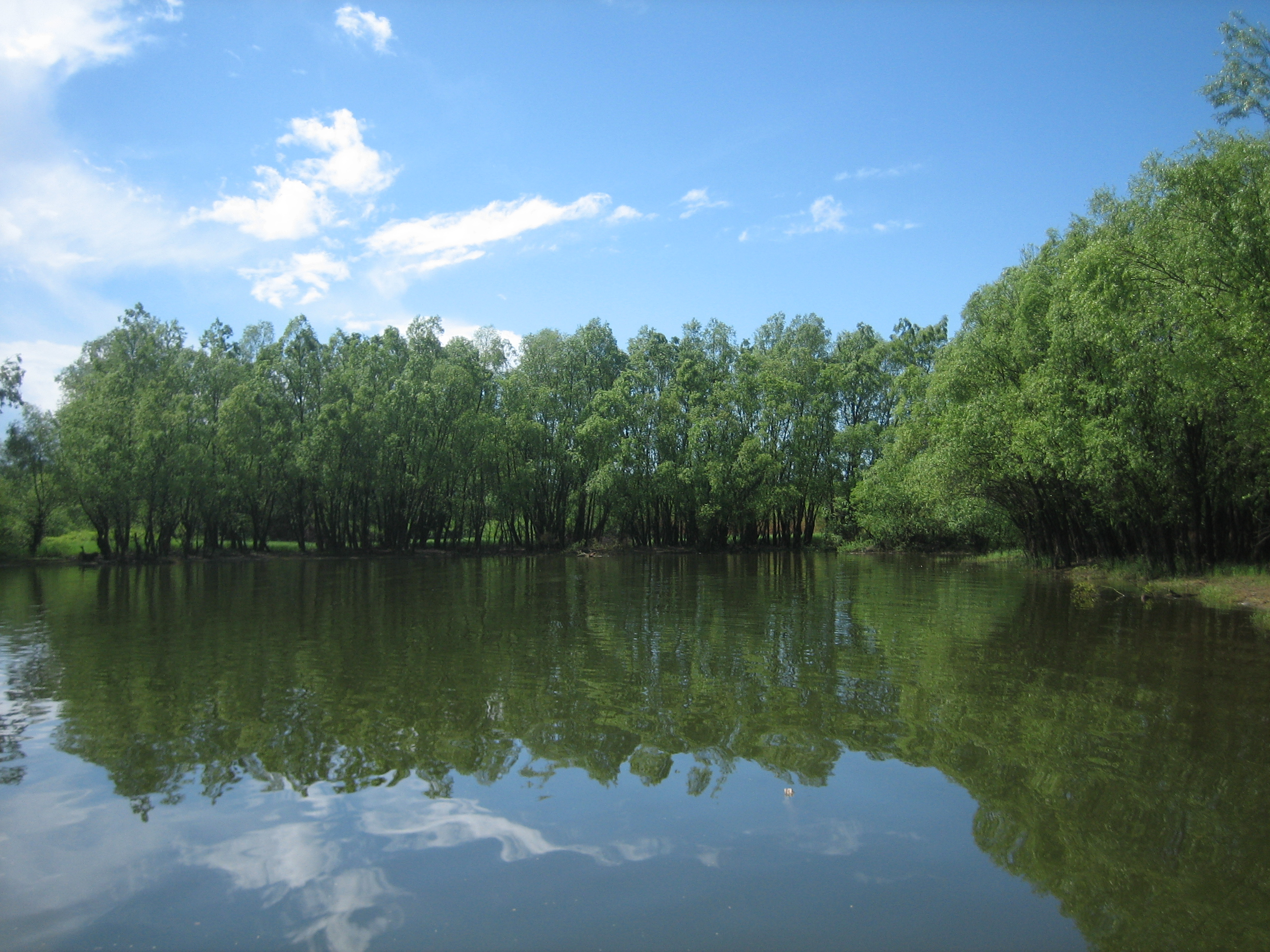 Kopački rit, a nature park in Baranja, eastern Croatia / Park prirode Kopački rit u Baranji.